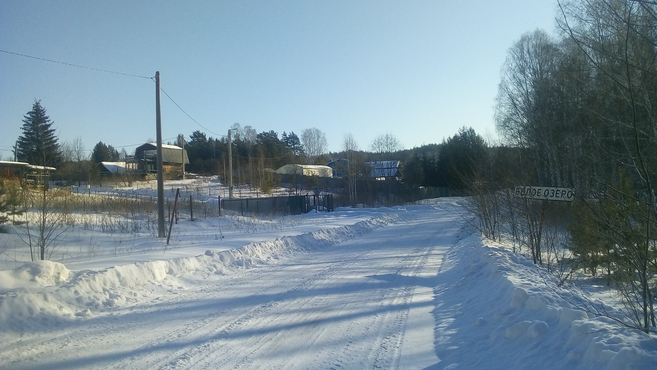 Въезд в посёлок Белое Озеро со стороны посёлка Большие Егусты.